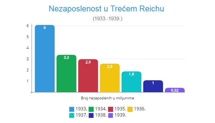 Grafikon nezaposlenosti u Trećem Reichu u periodu od 1933. do 1939.